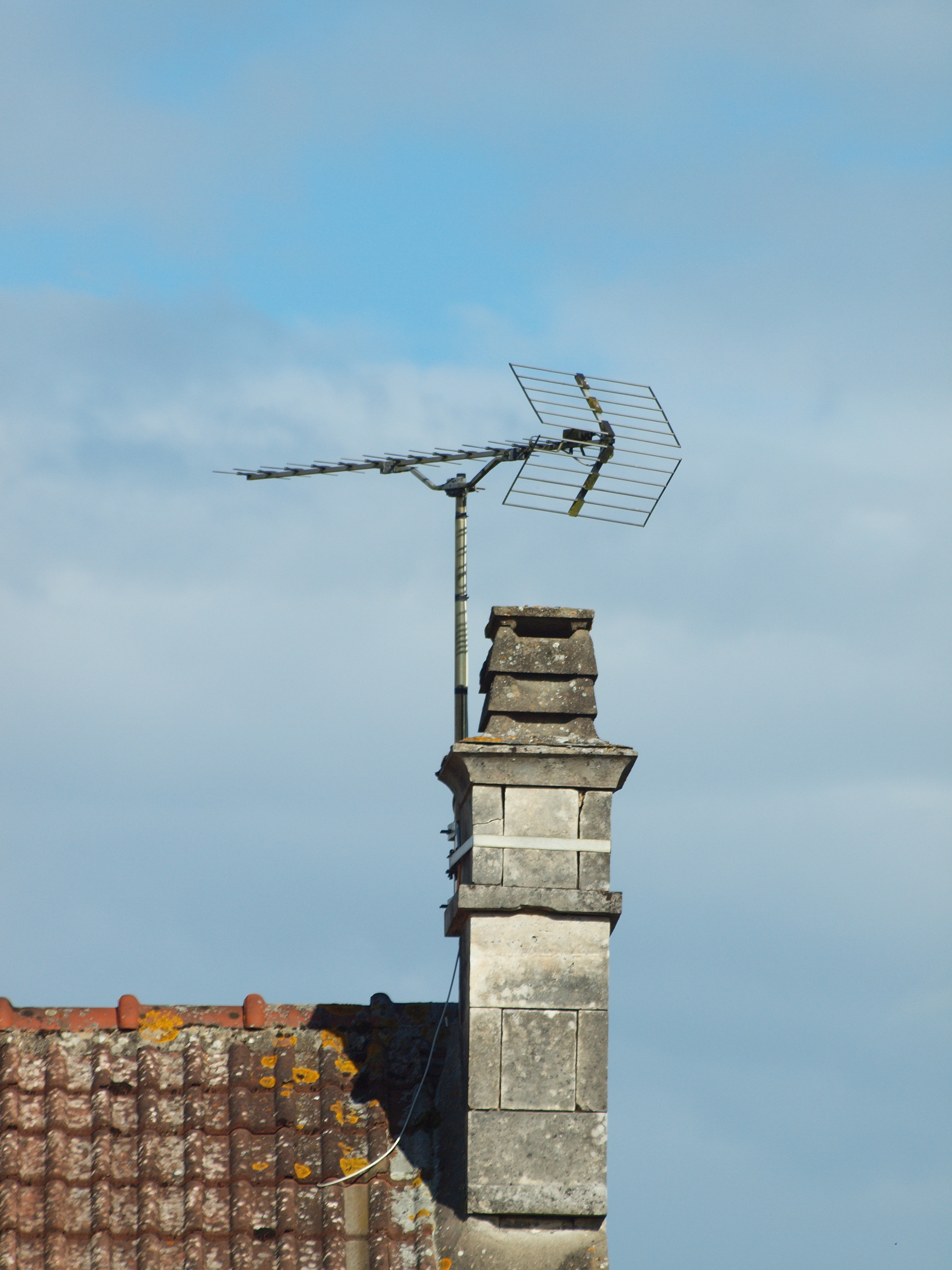 Sougères-en-Puisaye (Yonne, France)